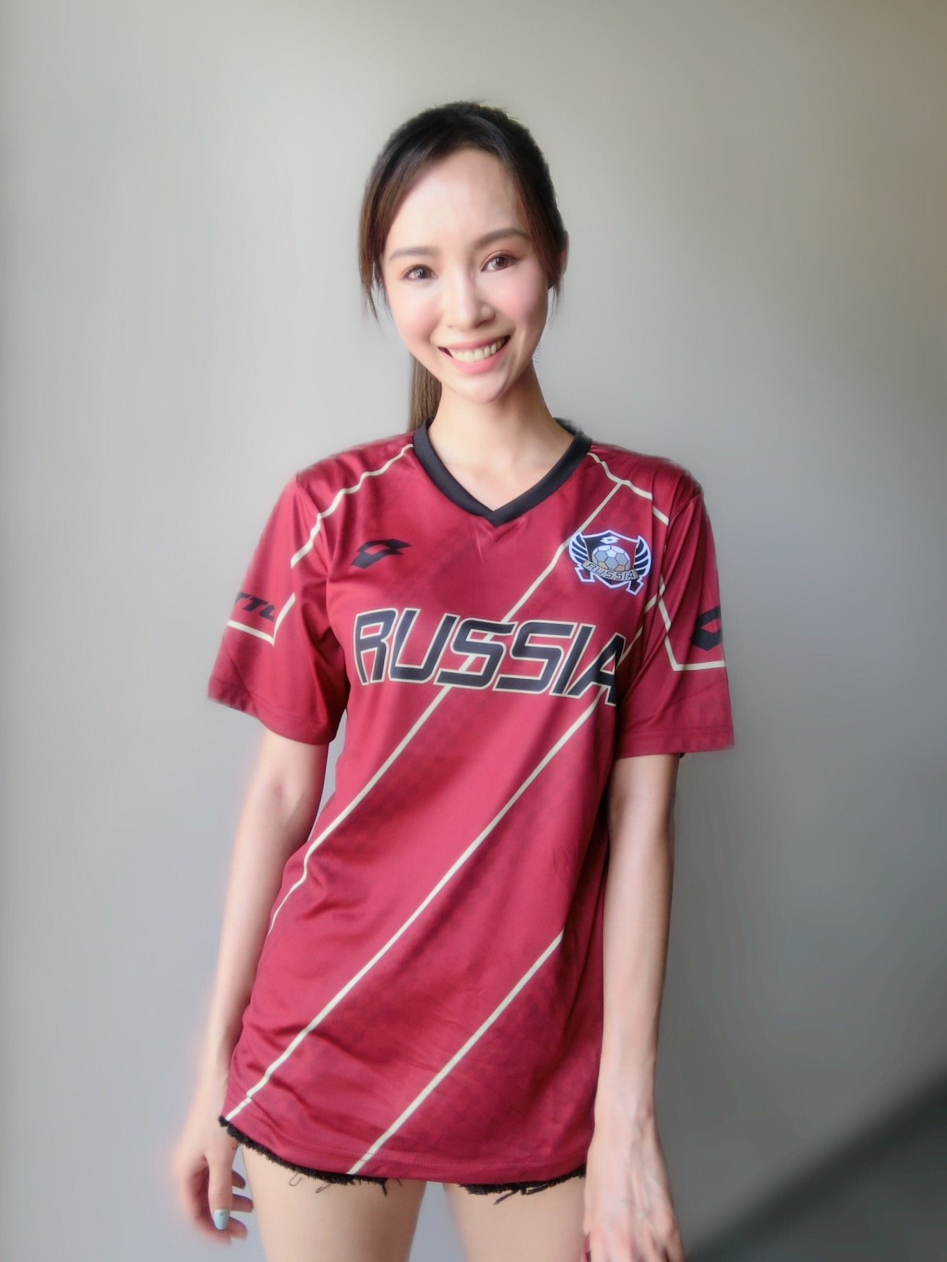 茵茵出席 2018 第二屆 Lotto CUP 樂得盃足球賽